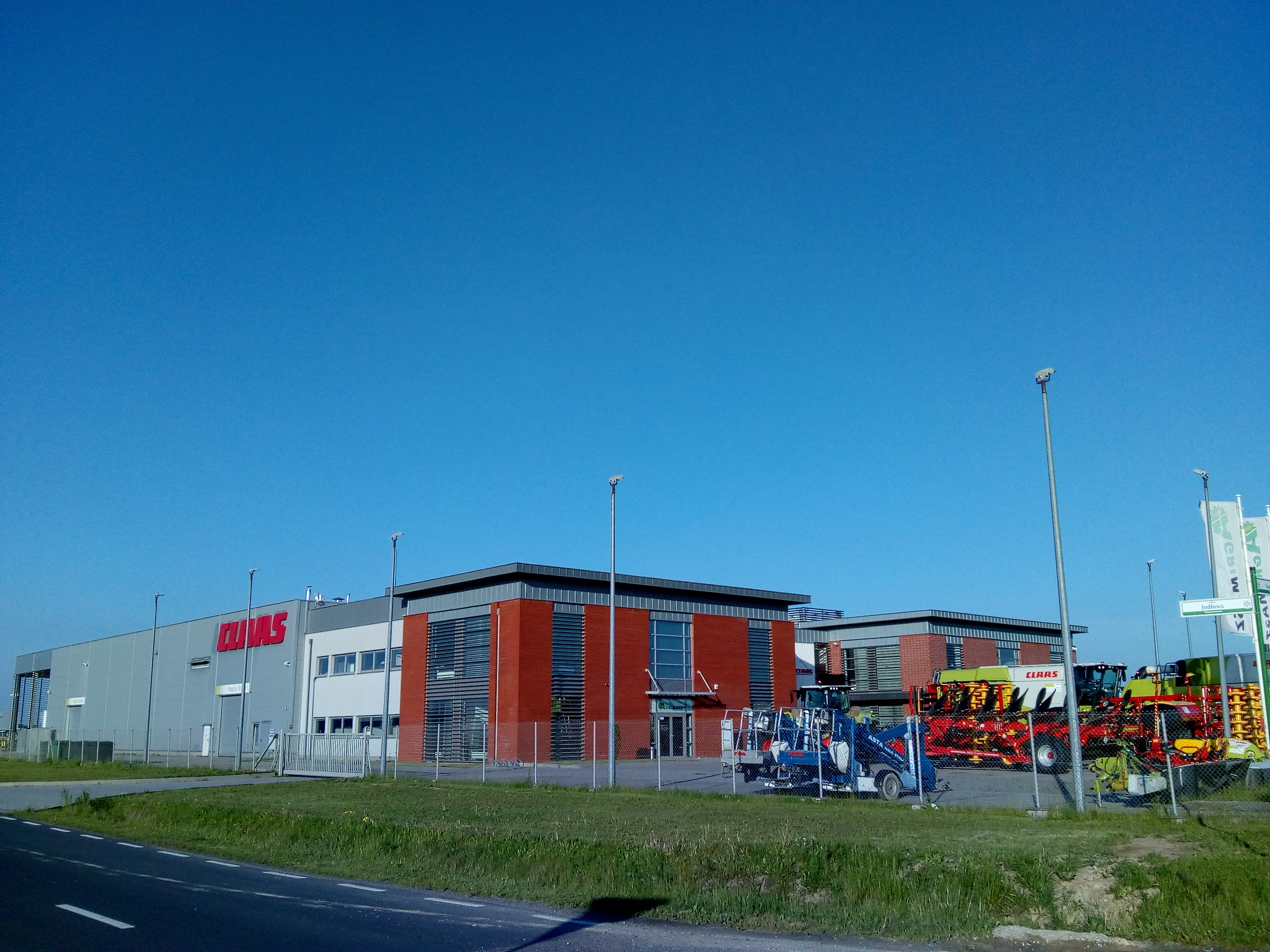 Firma Claas na terenie Parku Przemysłowego Buk